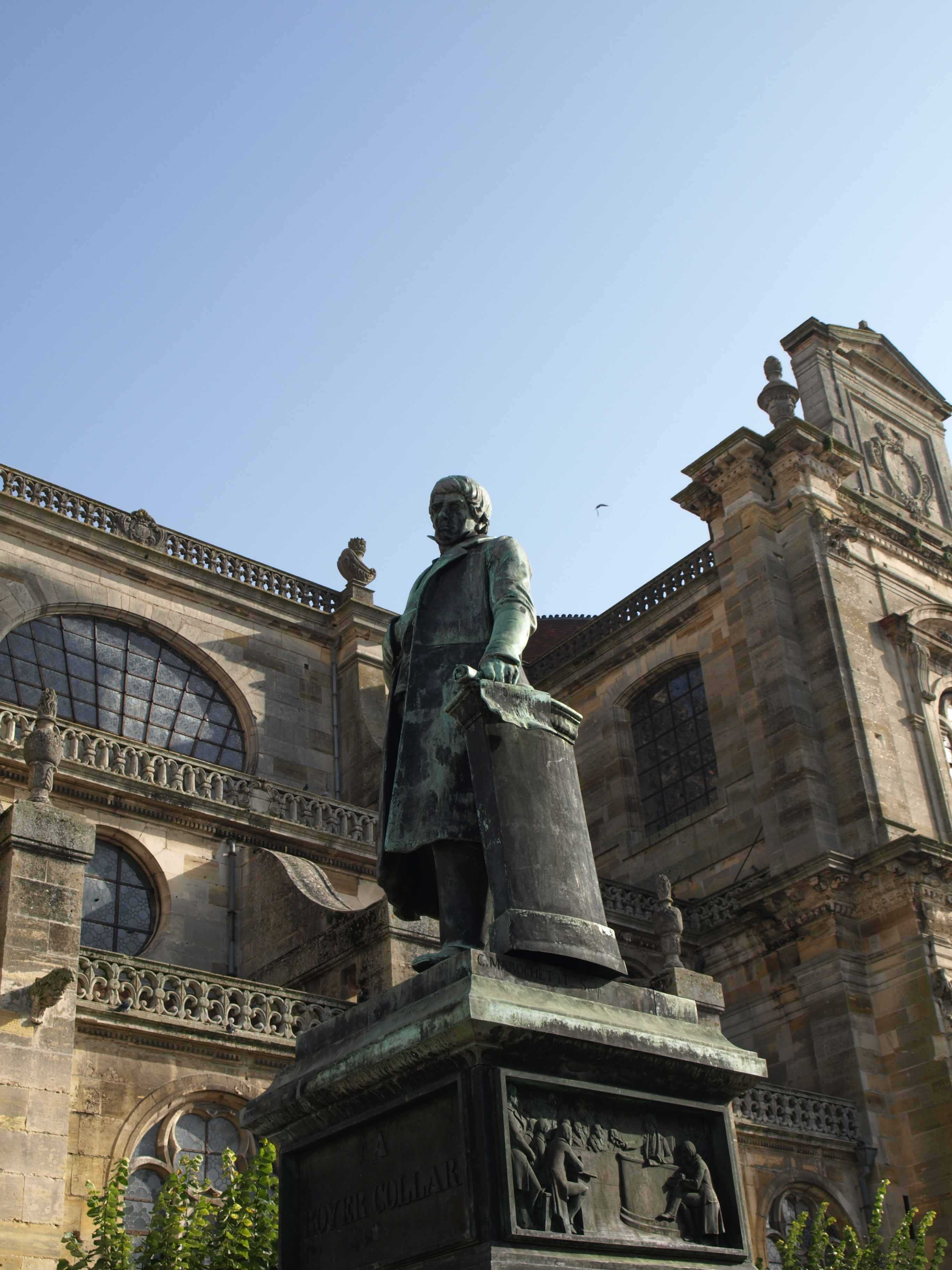 Vitry-le-François (51300 - FRANCE) : photographies Vitry-le-François (51300 - FRANCE) : Statue de Royer Collard (près de la collégiale Notre Dame)